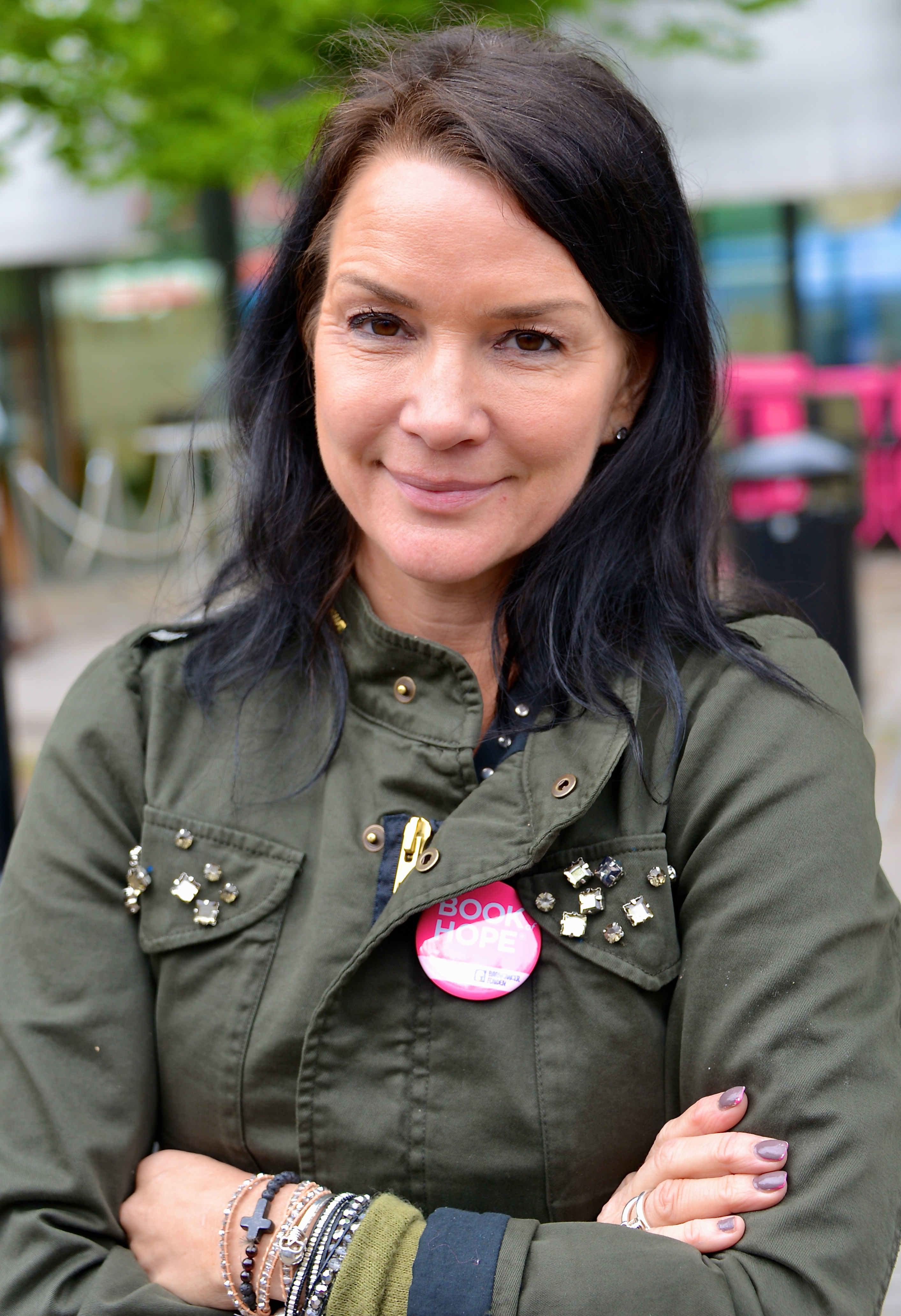 Sofia Wistam i Kungsträdgården i Stockholm den 22 maj 2013 i samband med kampanjen Book of Hope för Barncancerfonden.